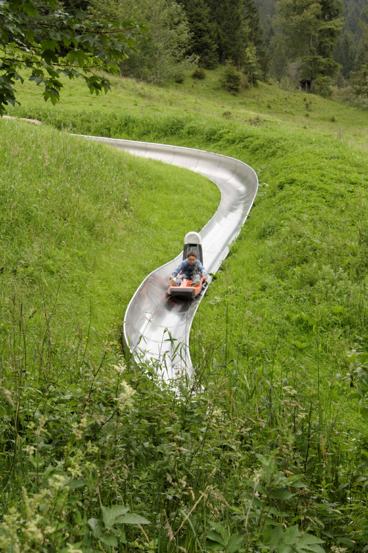 Unterammergau, Sommerrodelbahn